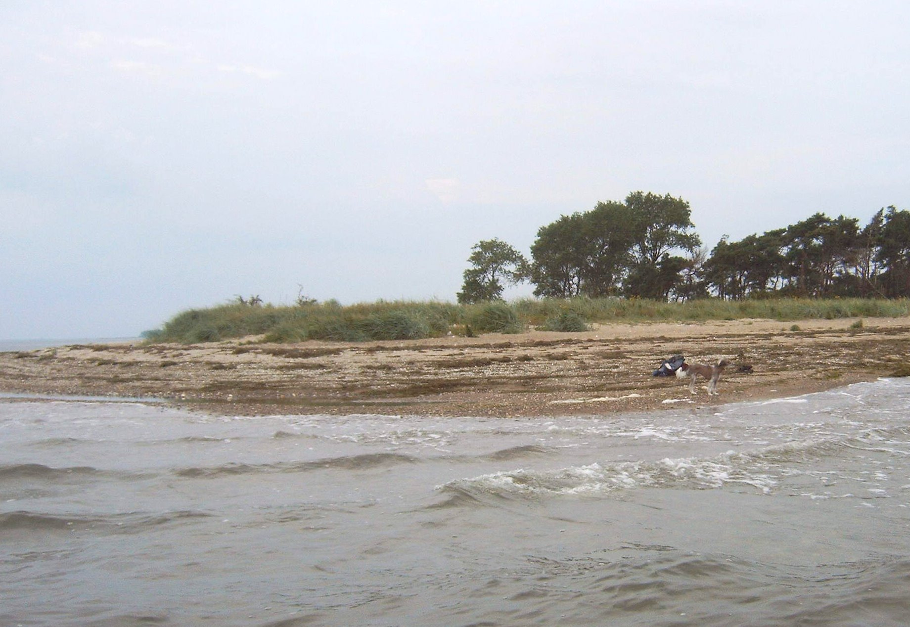 Palmer Ort, Südspitze der Insel Rügen, Deutschland